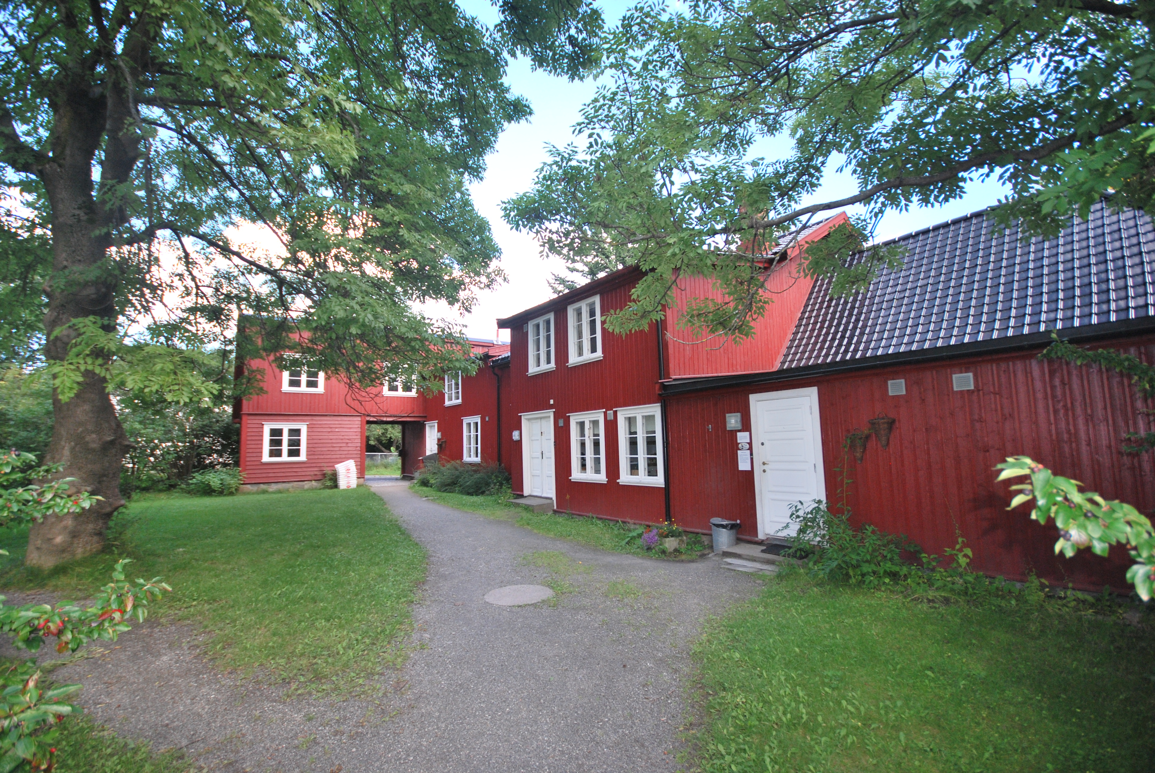 Bygning sannsynligvis fra Magdalenastiftelsen, i dage barnehage. Thulstrups gate 3, Lindern, Oslo